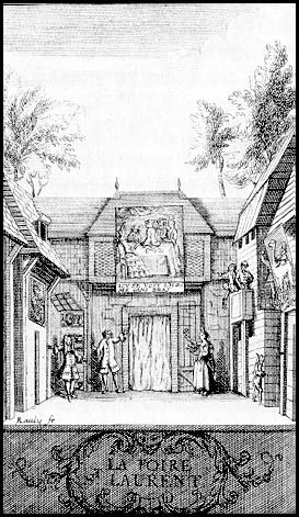 Foire Saint Laurent Paris, theatre scenery